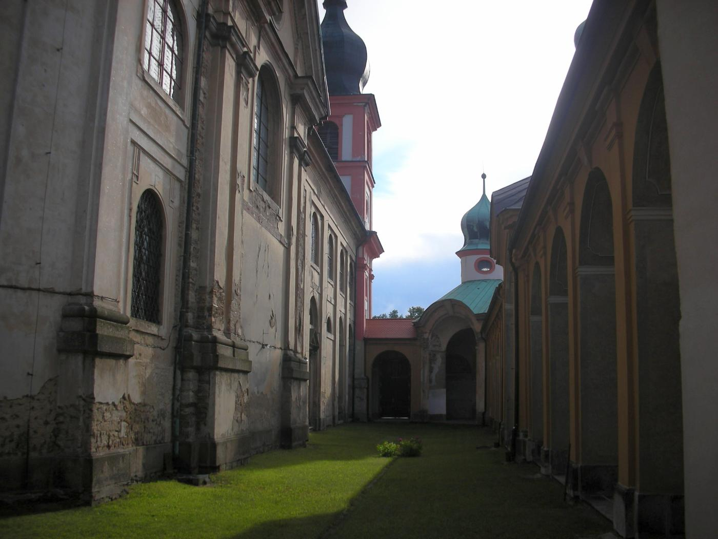 Innenhof Maria Kulm (Chlum Svaté Maří) im Jahr 2012